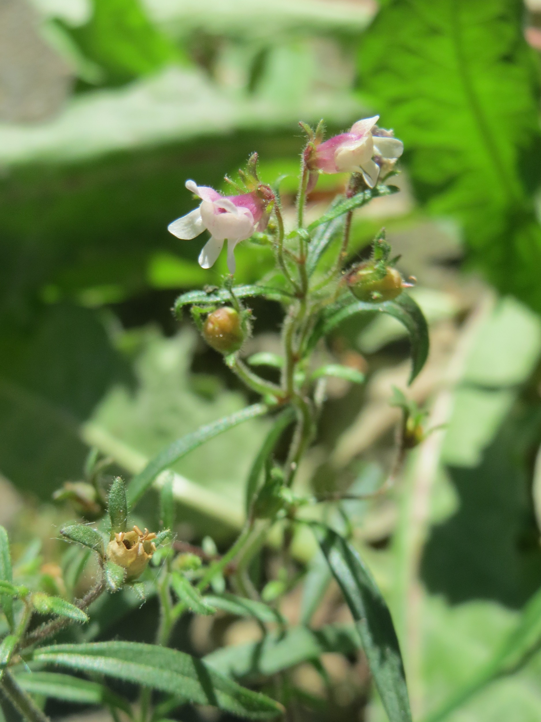 Ritzenbotanik: Kleines Leinkraut (Chaenorhinum minus) in Sankt Arnual